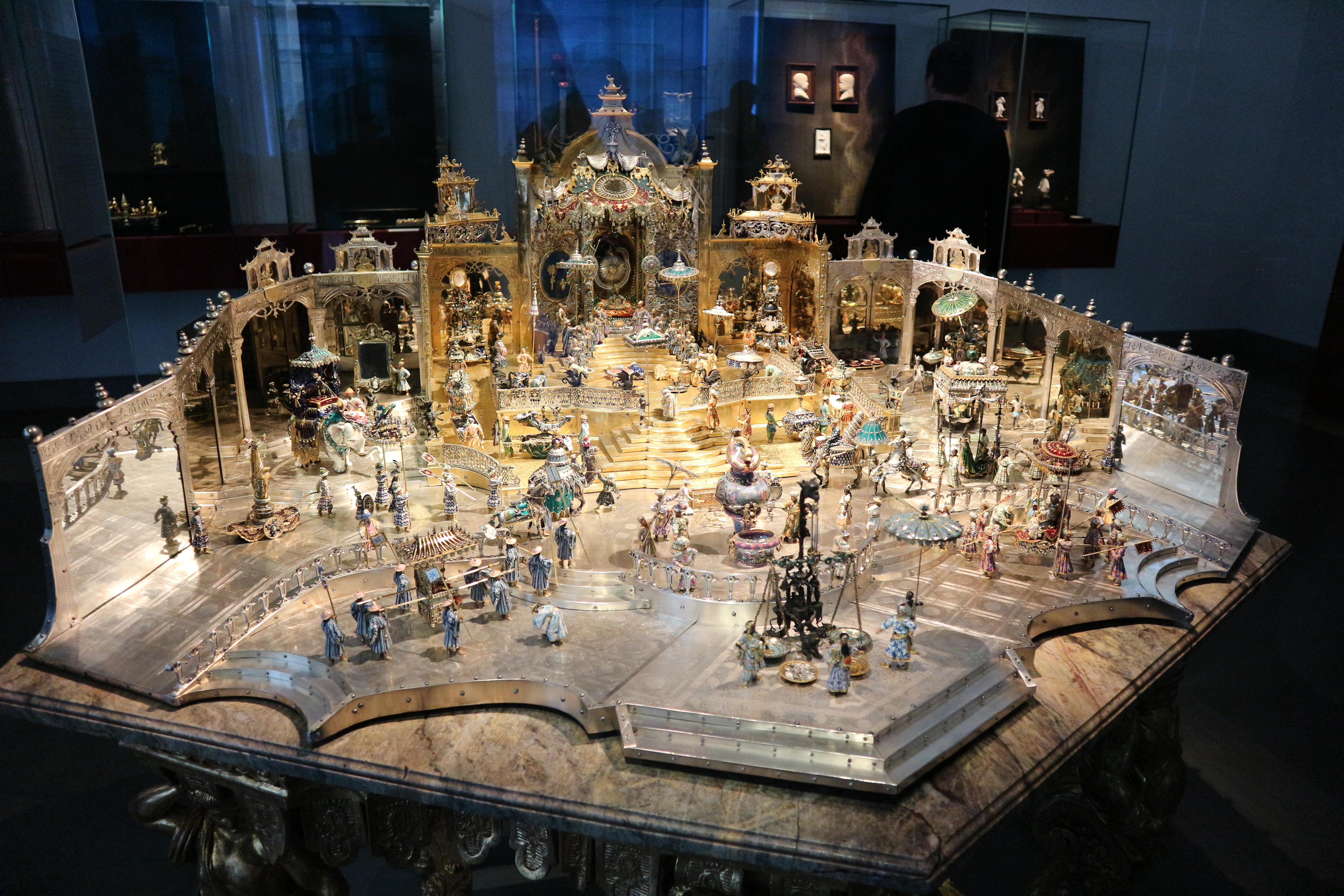 Der Thron des GroßmogulVom Hofjuwelier angefertigtes Kleinod für August dem Starken. Befindet sich heute im Grünen Gewölbe in dresden